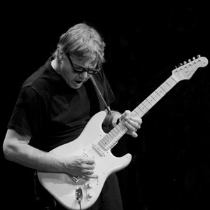 Steve Miller Live